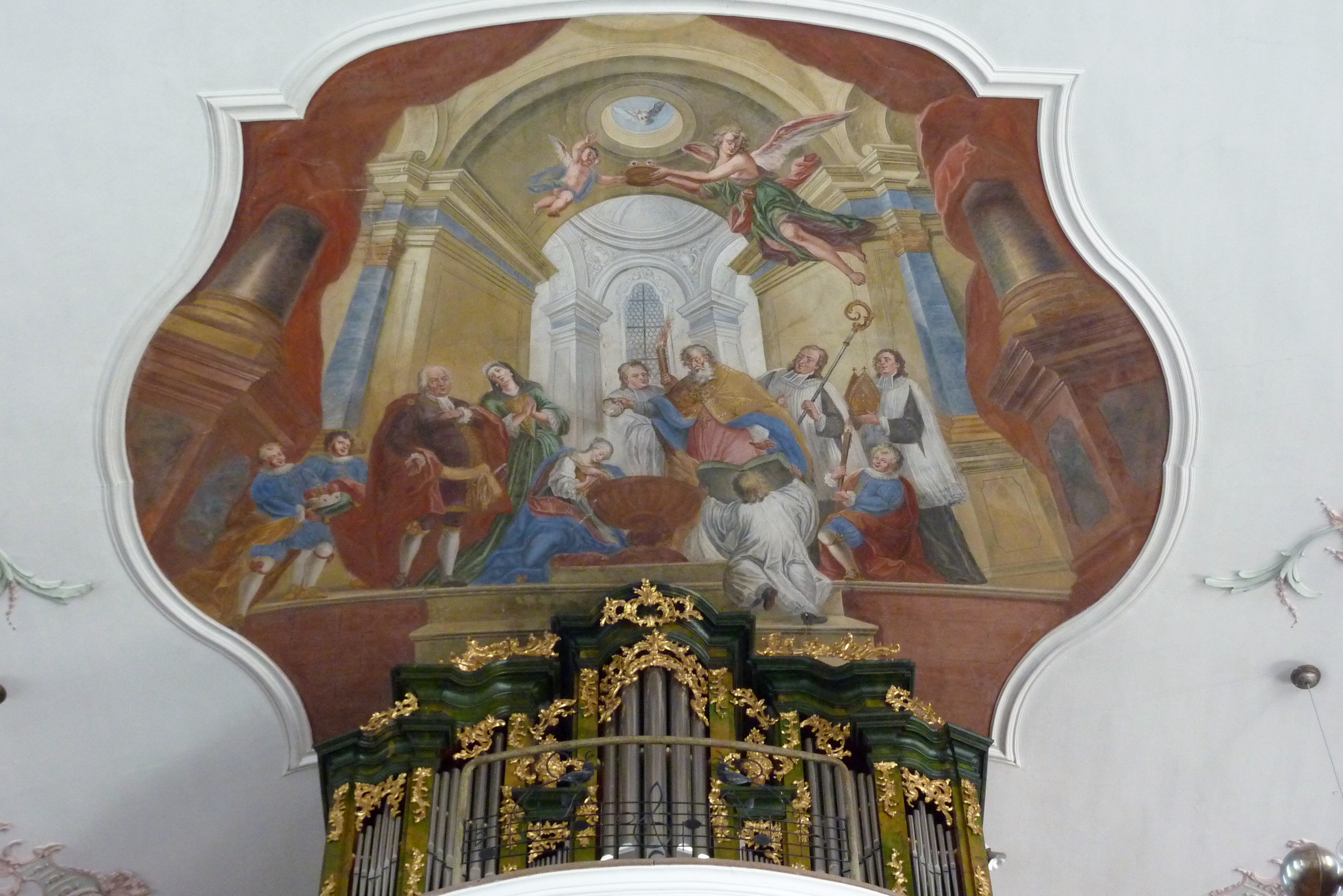 Katholische Pfarrkirche St. Peter in Tapfheim im Landkreis Donau-Ries (Bayern), Deckenmalerei über der Empore, um 1750, von Anton Enderle (1700-1761); Darstellung: Bischof Erhard von Regensburg tauft die blind geborene Ottilie